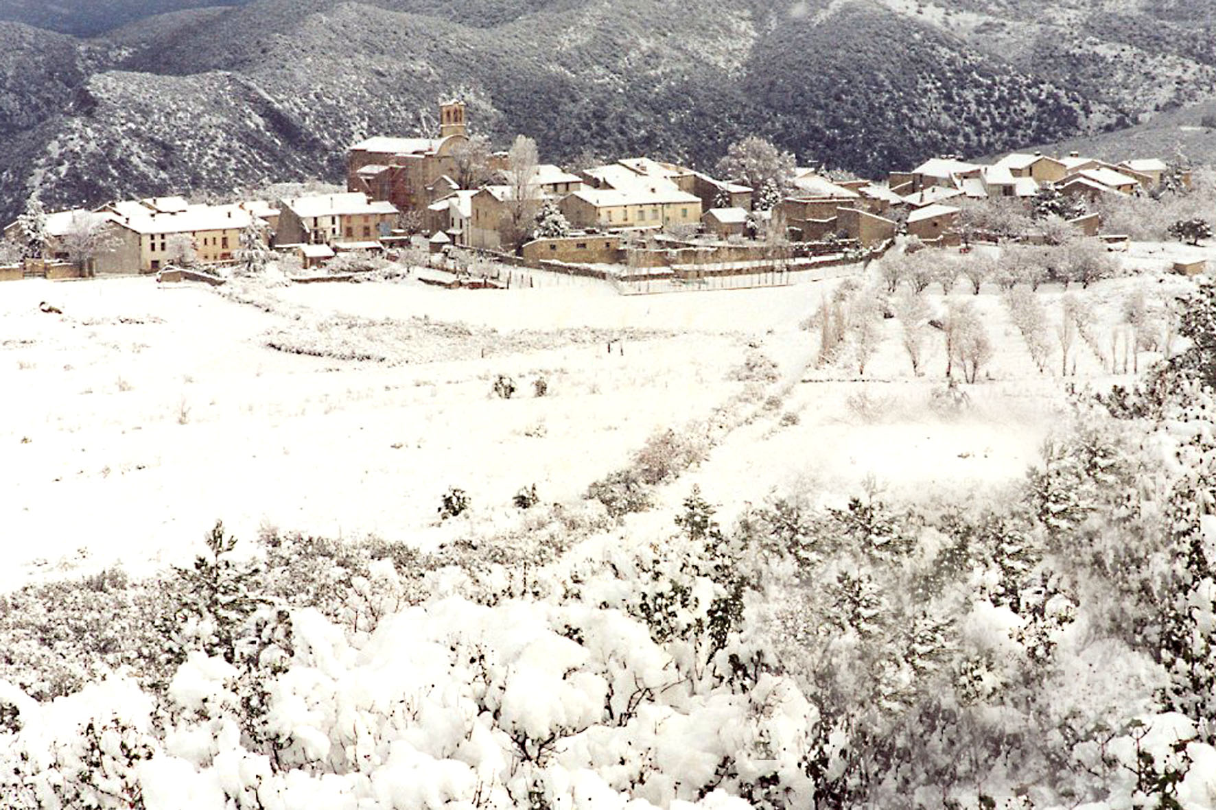 Village de Campoussy sous la neige.